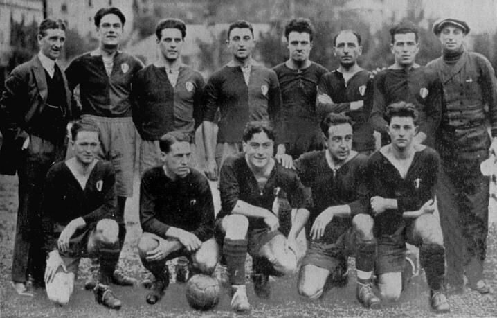 La formazione del Genoa 1924-25 con lo scudetto sul petto Licensing 1925